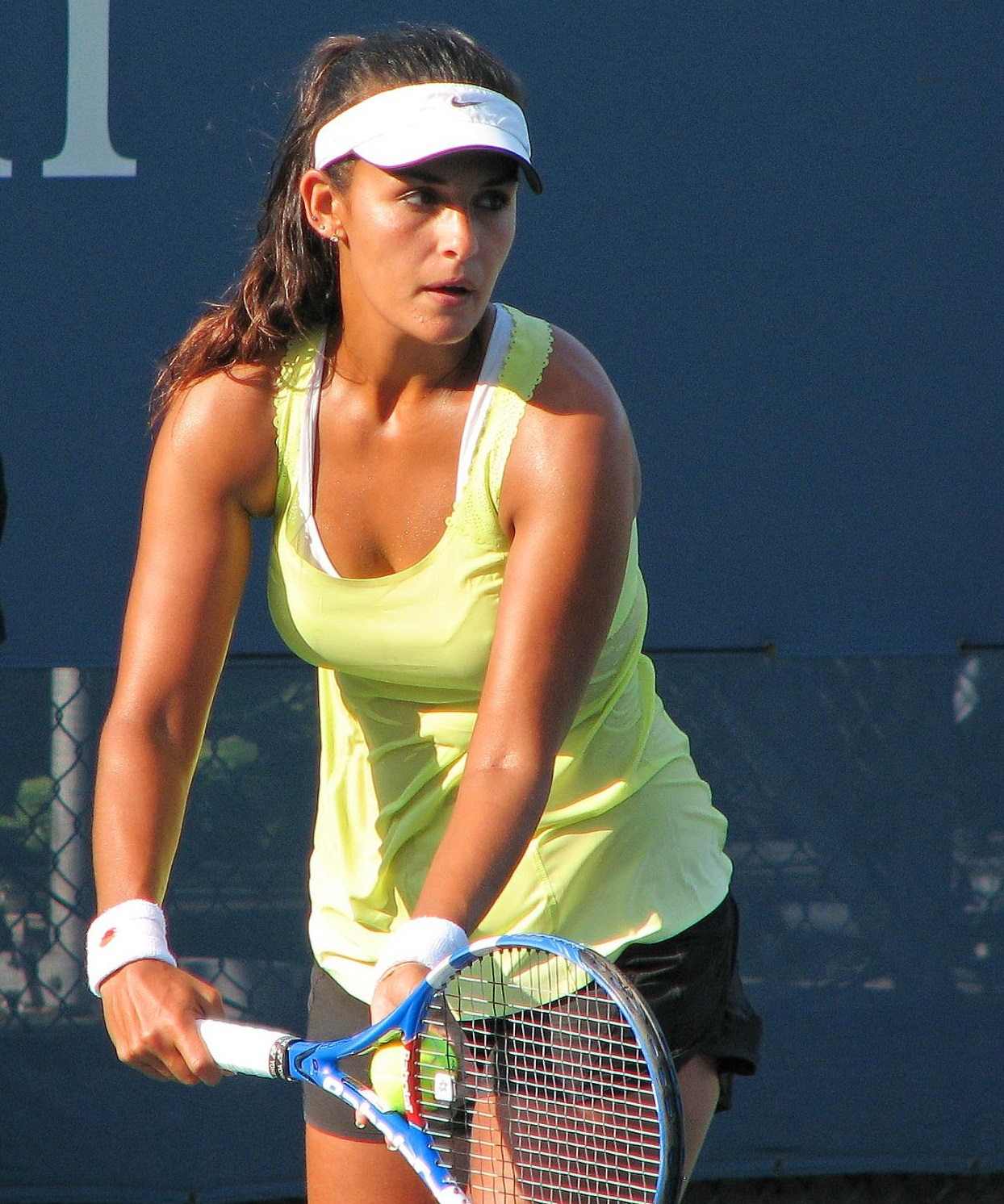 Heidi El Tabakh in 2011